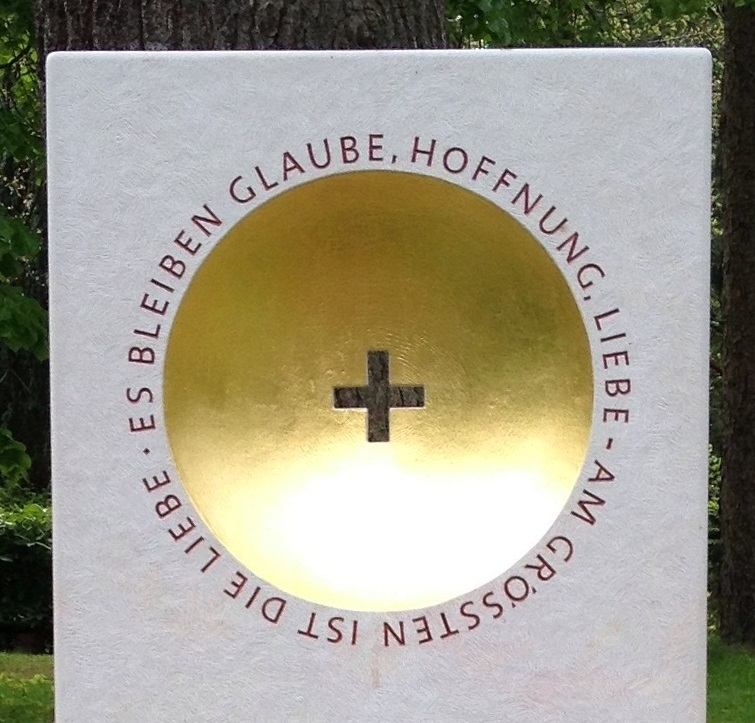 Goslar, Alter Friedhof, Grabstein von Hans-Christian Reichelt (1935-2012), Pastor an der Neuwerkkirche Goslar bis 2000